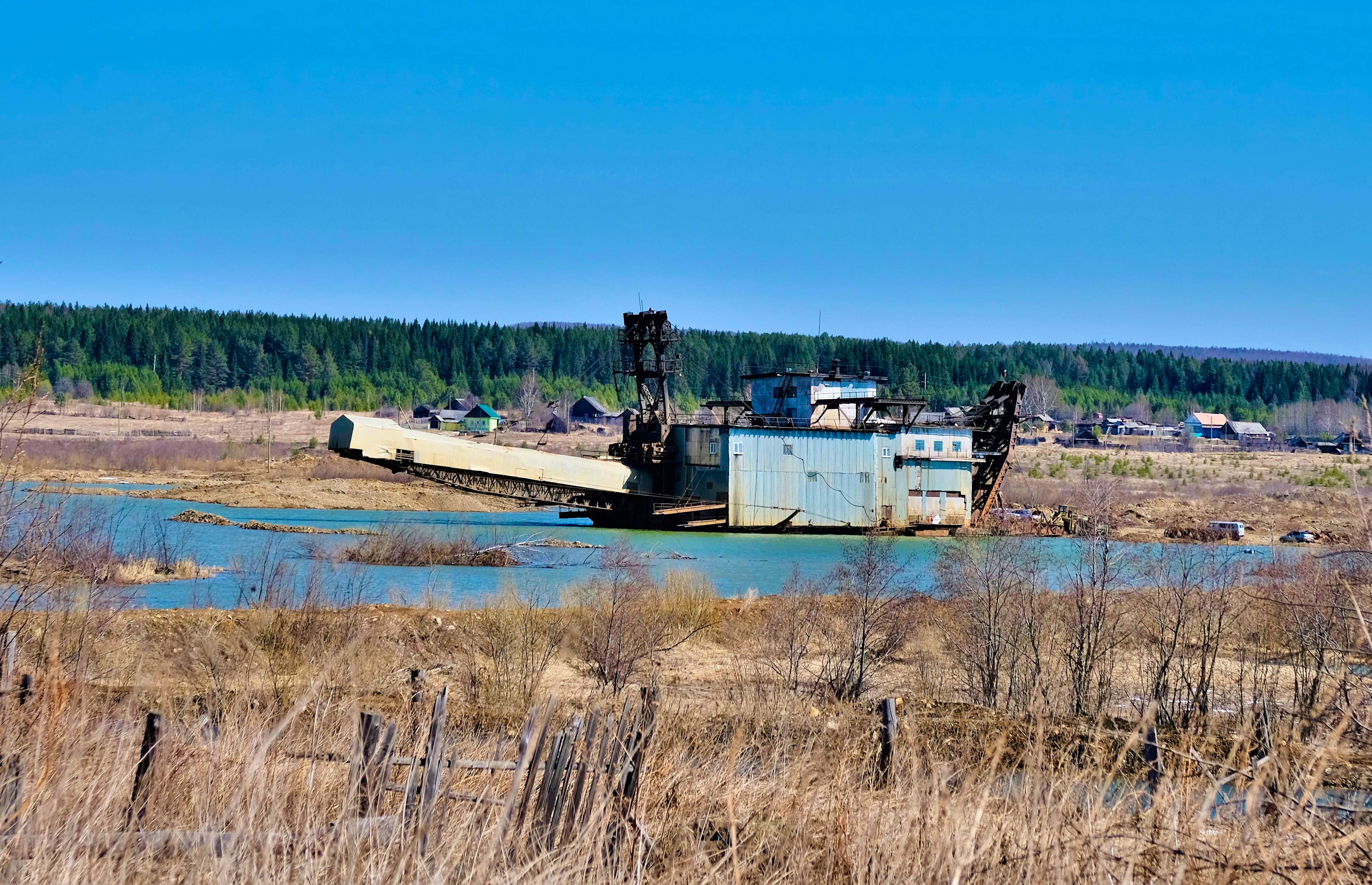 Золотодобычная драга на реке Ис